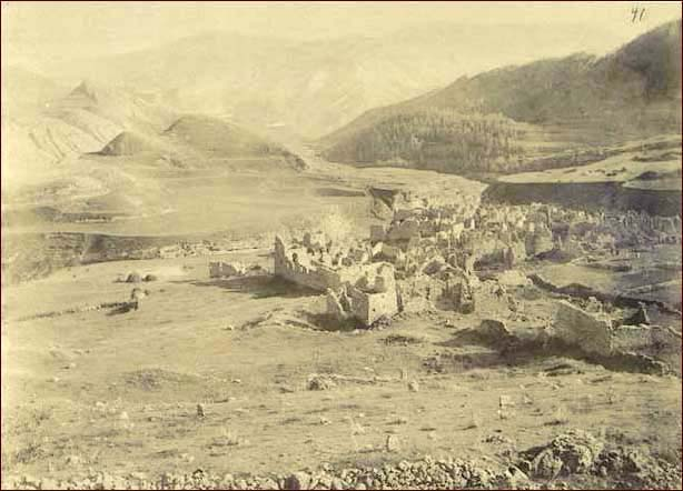 руины Ахульго